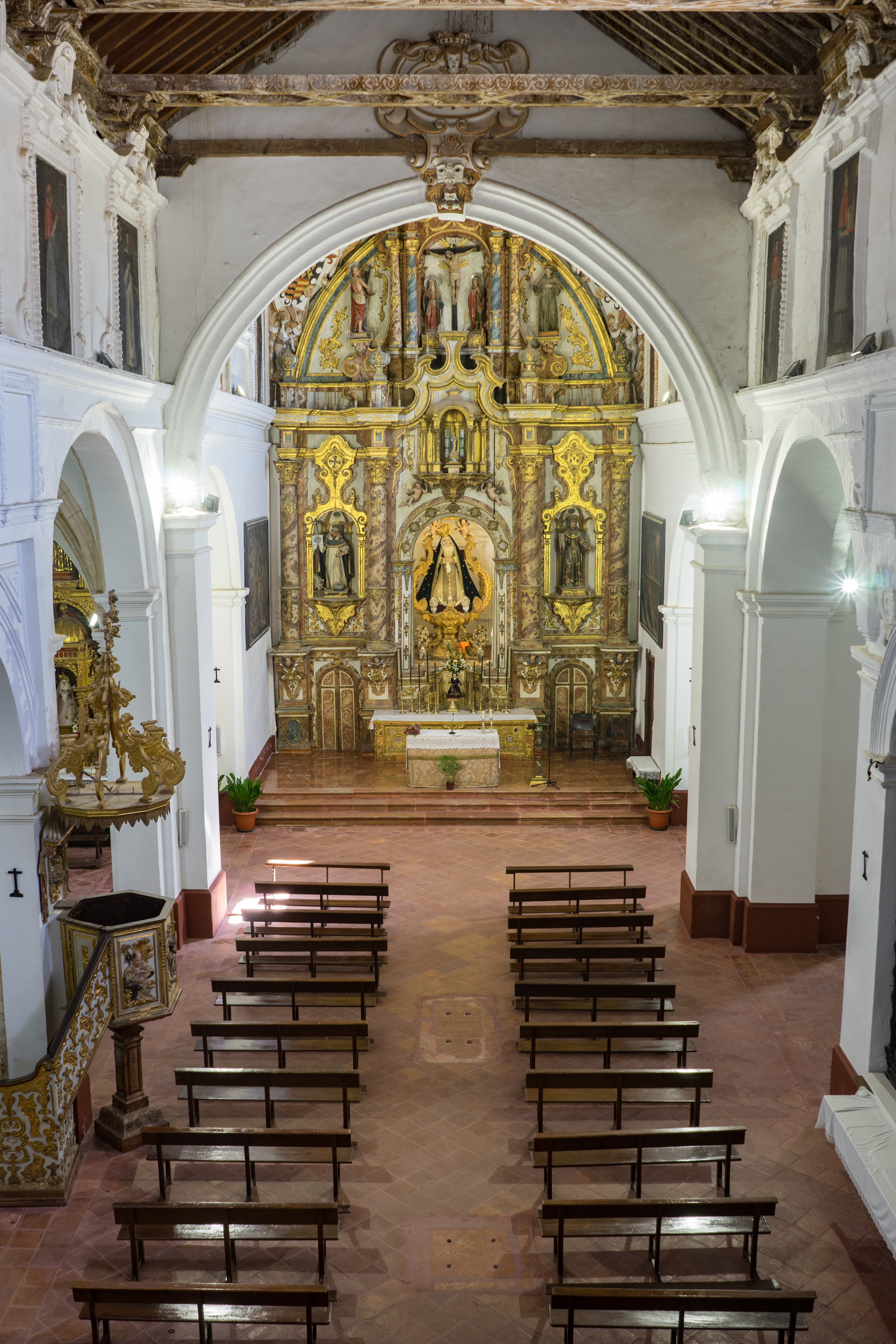 Nave principal desde el coro de la Iglesia de San Francisco de Antequera